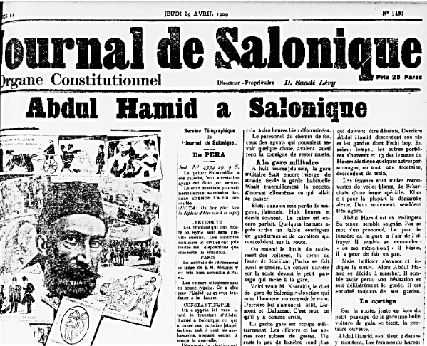 "Journal de Salonique".